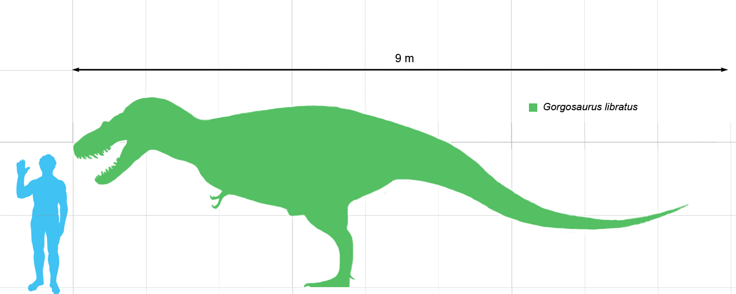 Size comparison chart for Gorgosaurus libratus